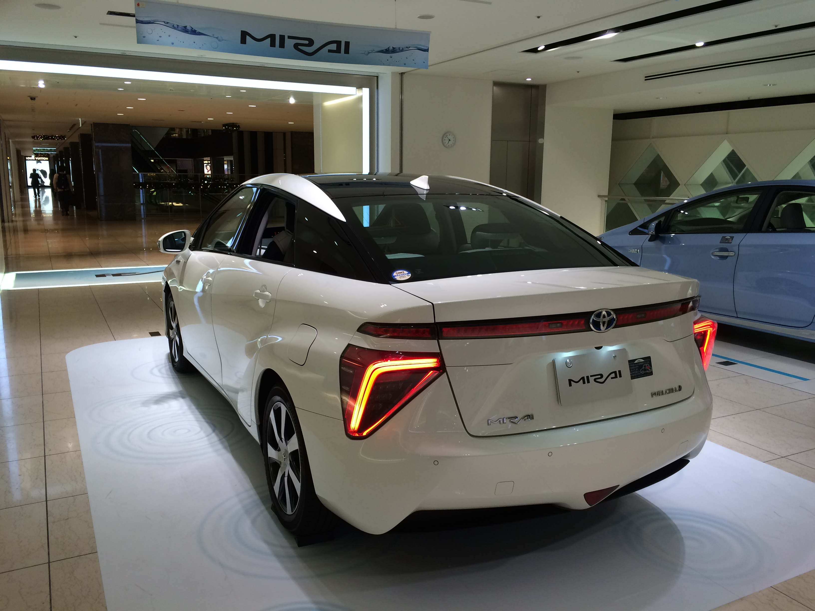 トヨタ MIRAI 後